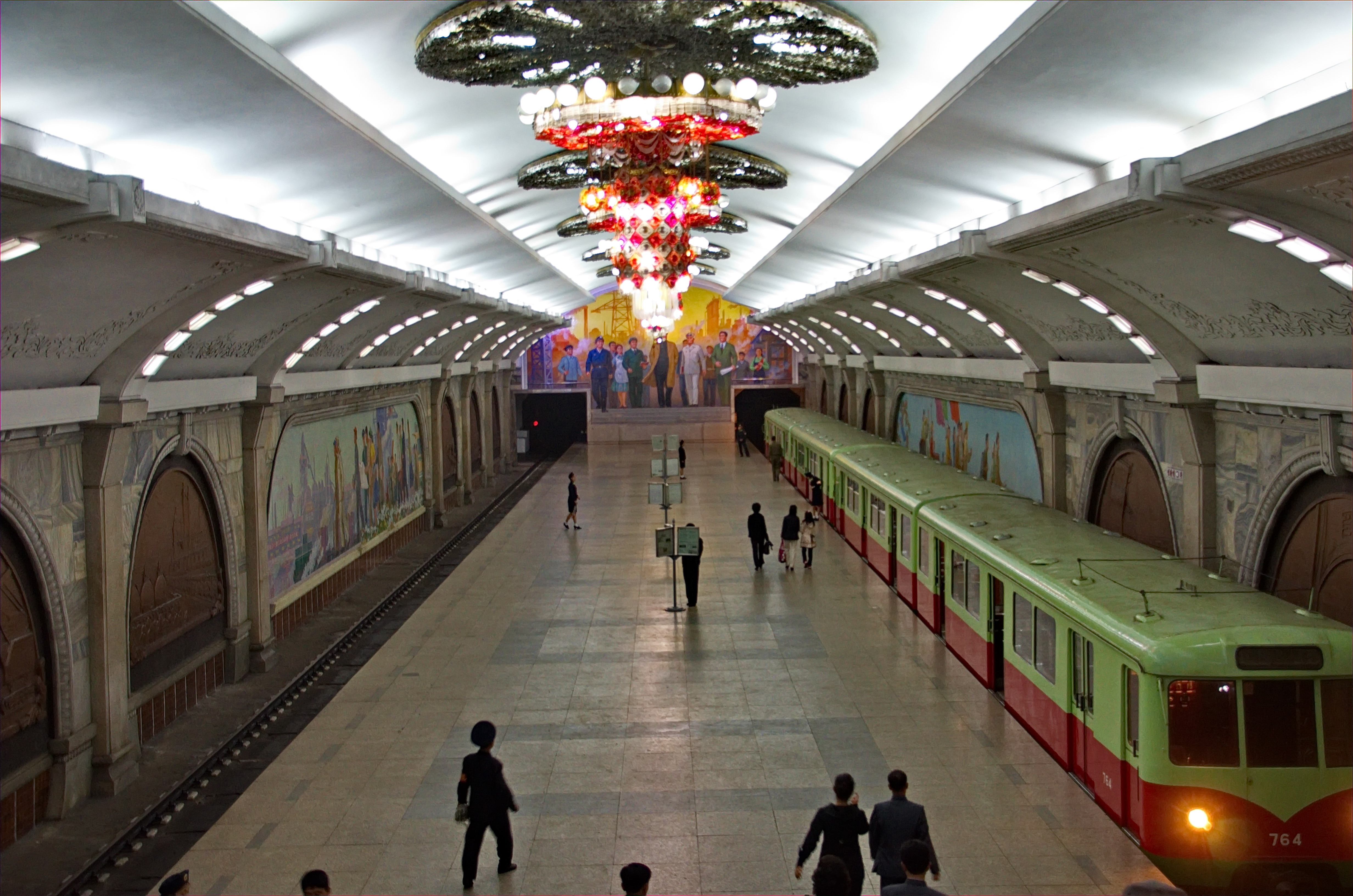 Nordkorea 2015 - Pjöngjang - Metro